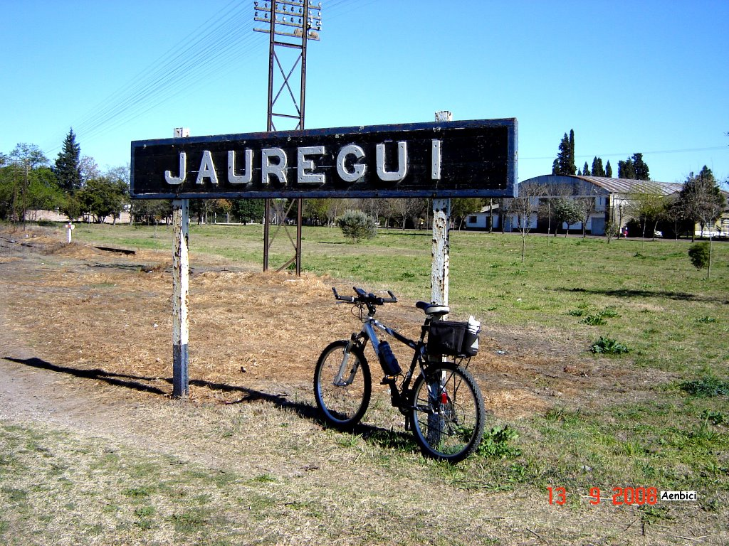 Entrada a el pueblo Jauregui